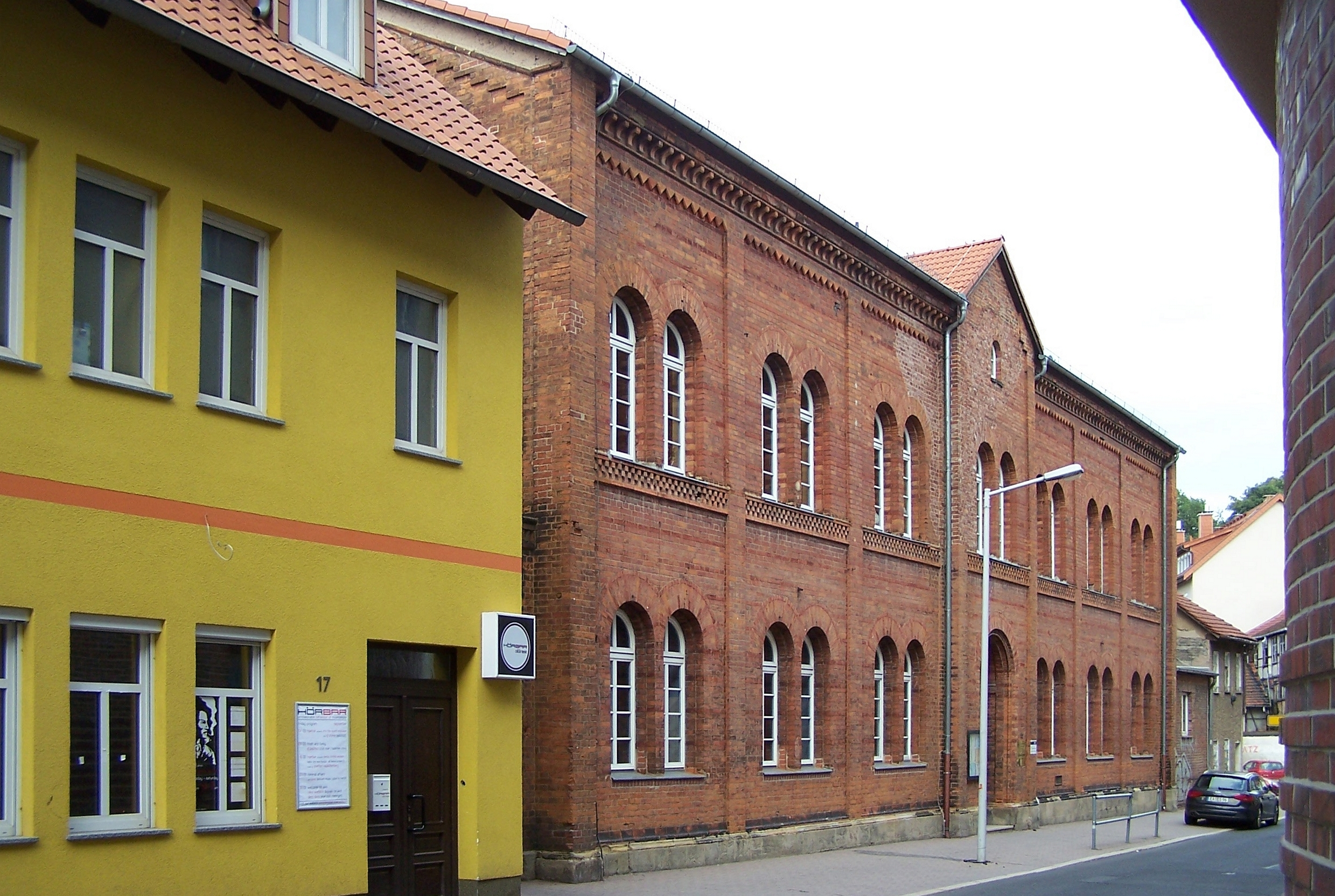 Das Schulgebäude in der Schmelzerstraße 19 wird heute von der Volkshochschule genutzt.